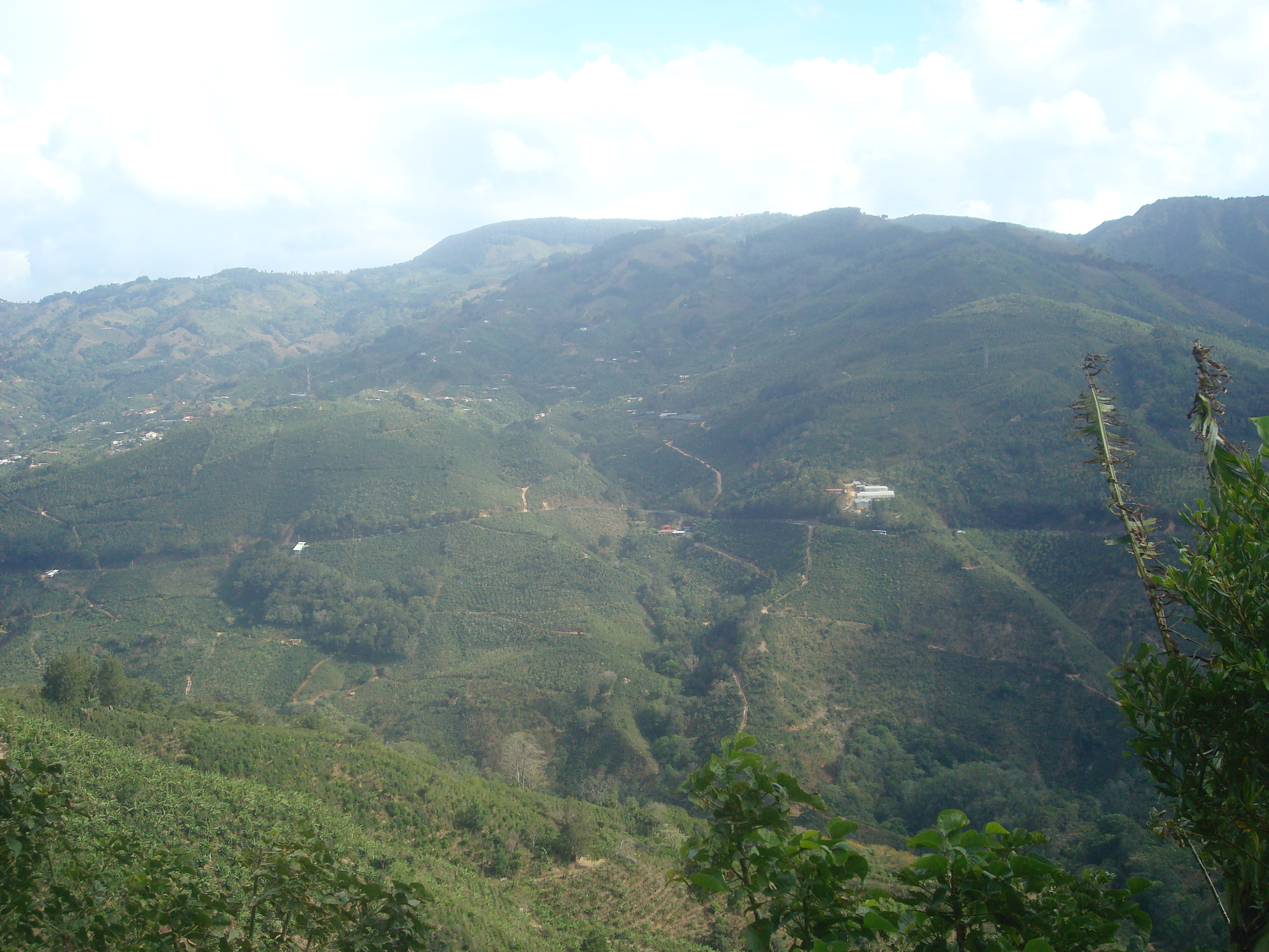 Extensos cafetales en la zona de los Santos, cantón de León Cortés Castro. Costa Rica.